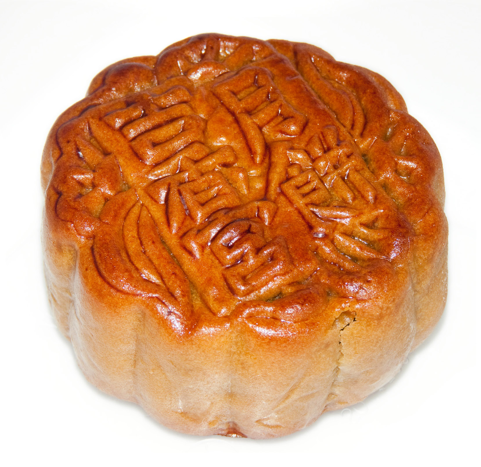 Traditionnel gâteau de lune servi pour fêter la lune. C'est la deuxième fête de l'année dans l'ordre d'importance dans le calendrier chinois.